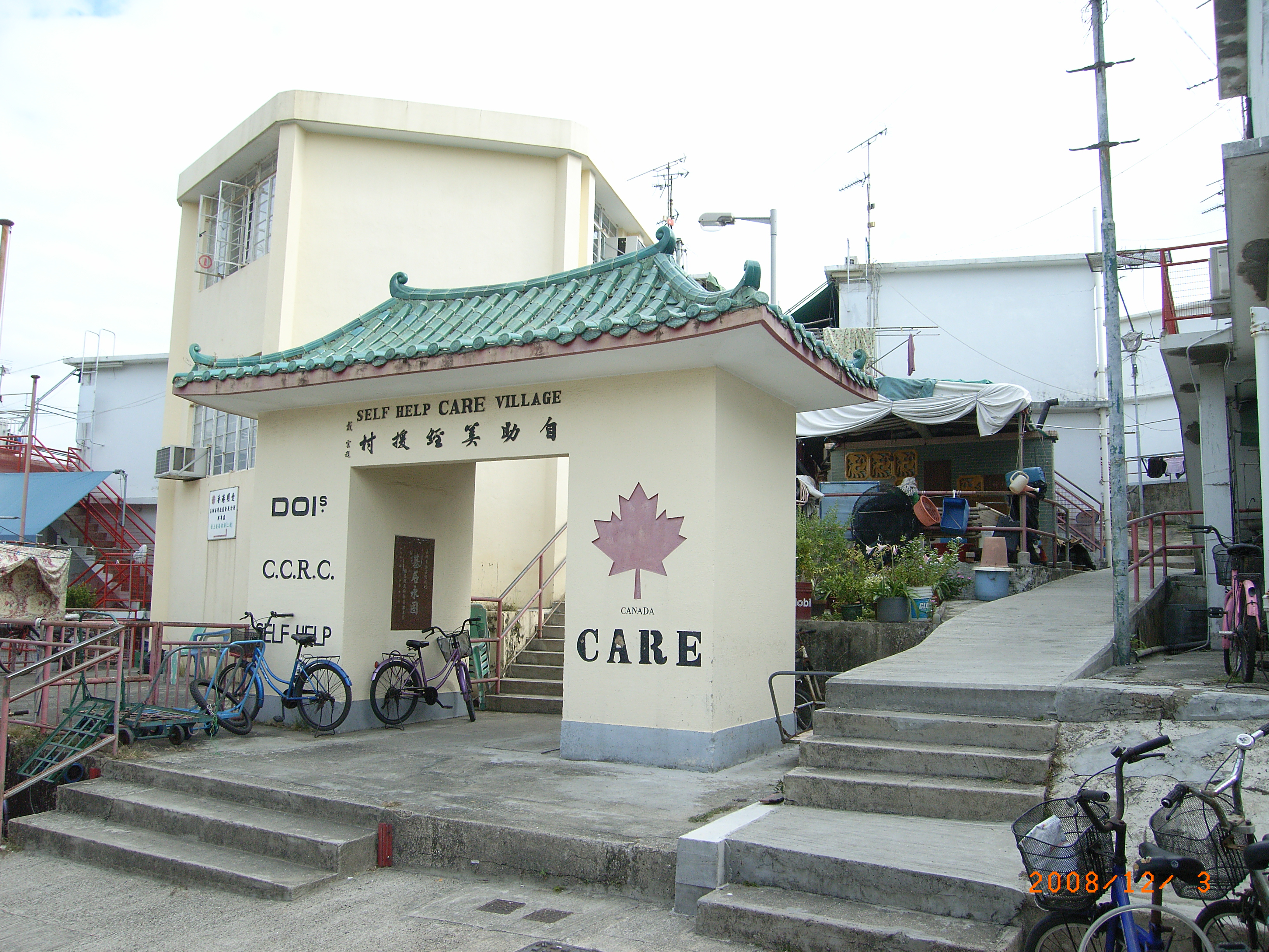 中文（香港）: 自助美經援村